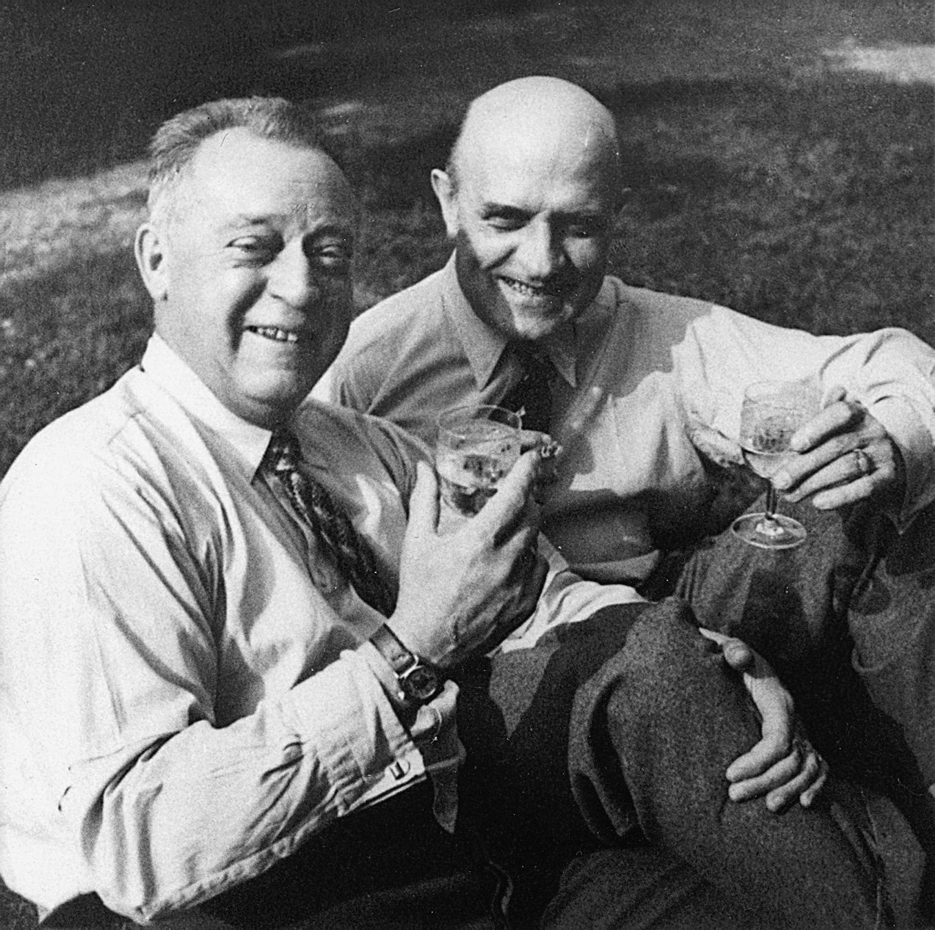 Die Schriftsteller Karl Hans Strobl (links) und Mirko Jelusich)